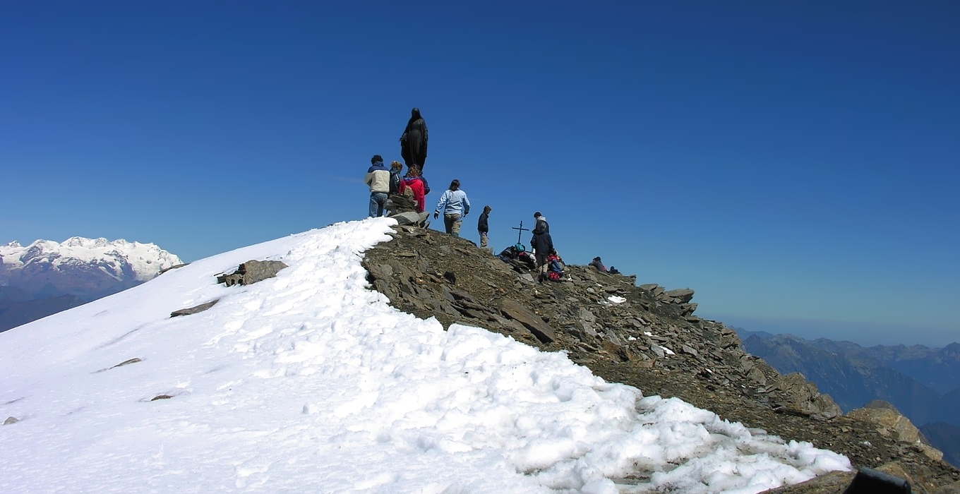 Il massiccio del Monte Rosa visto dalla punta Tersiva - Alpi Graie - Italy